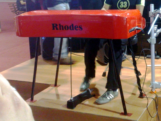 Rhodes Mark 7 electric piano Expomusic 2010